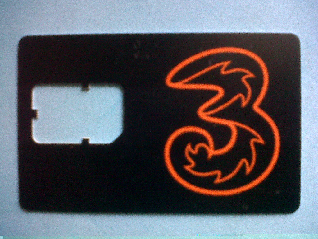 Kartu GSM 3 (Tri) versi Indonesia